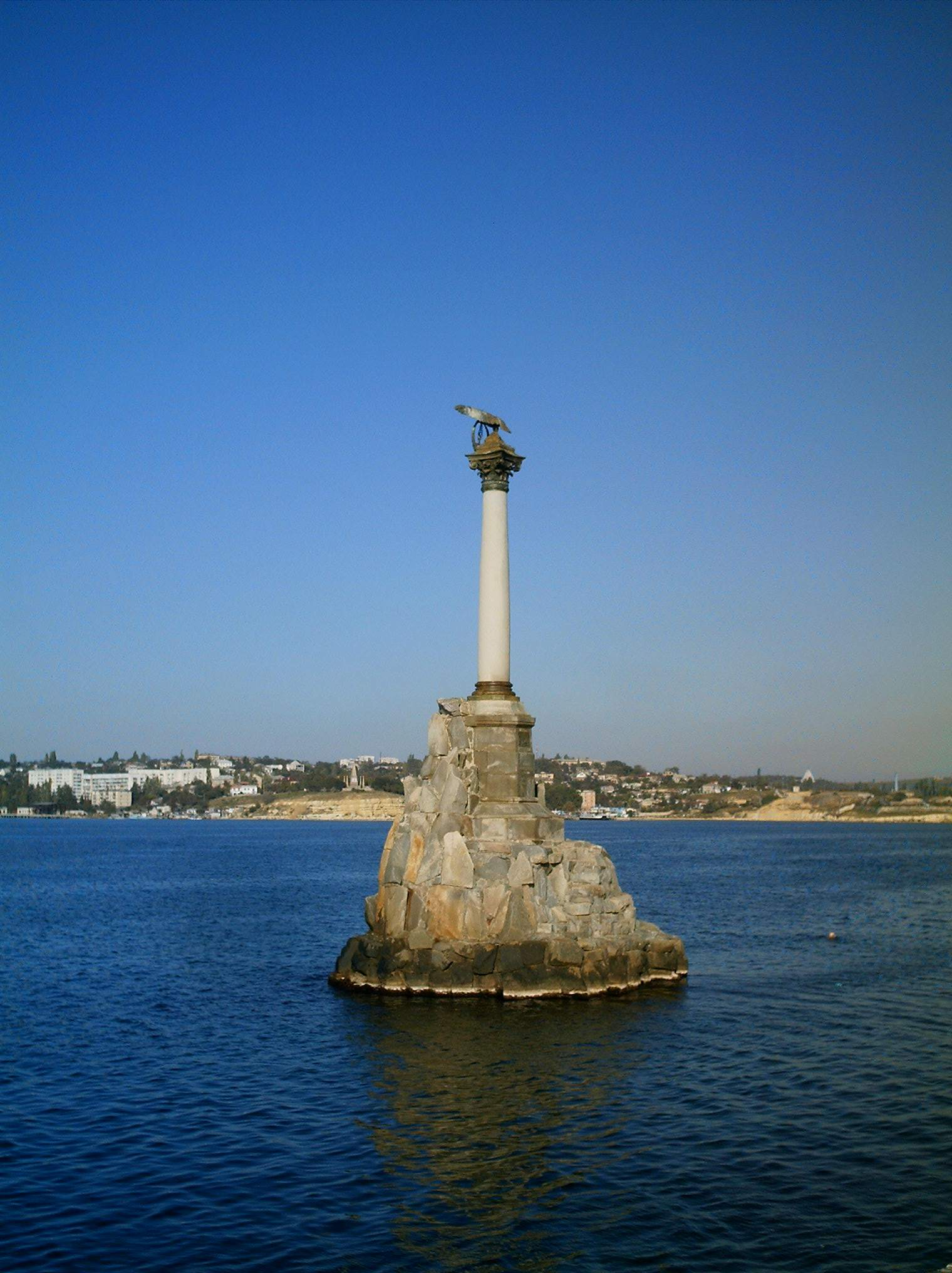 Пам'ятник затопленим кораблям в Севастополі. Збудований 1905 року з нагоди 50-річчя оборони Севастополя російськими військами у ході Кримської війни. Скульптор - А. Адамсон